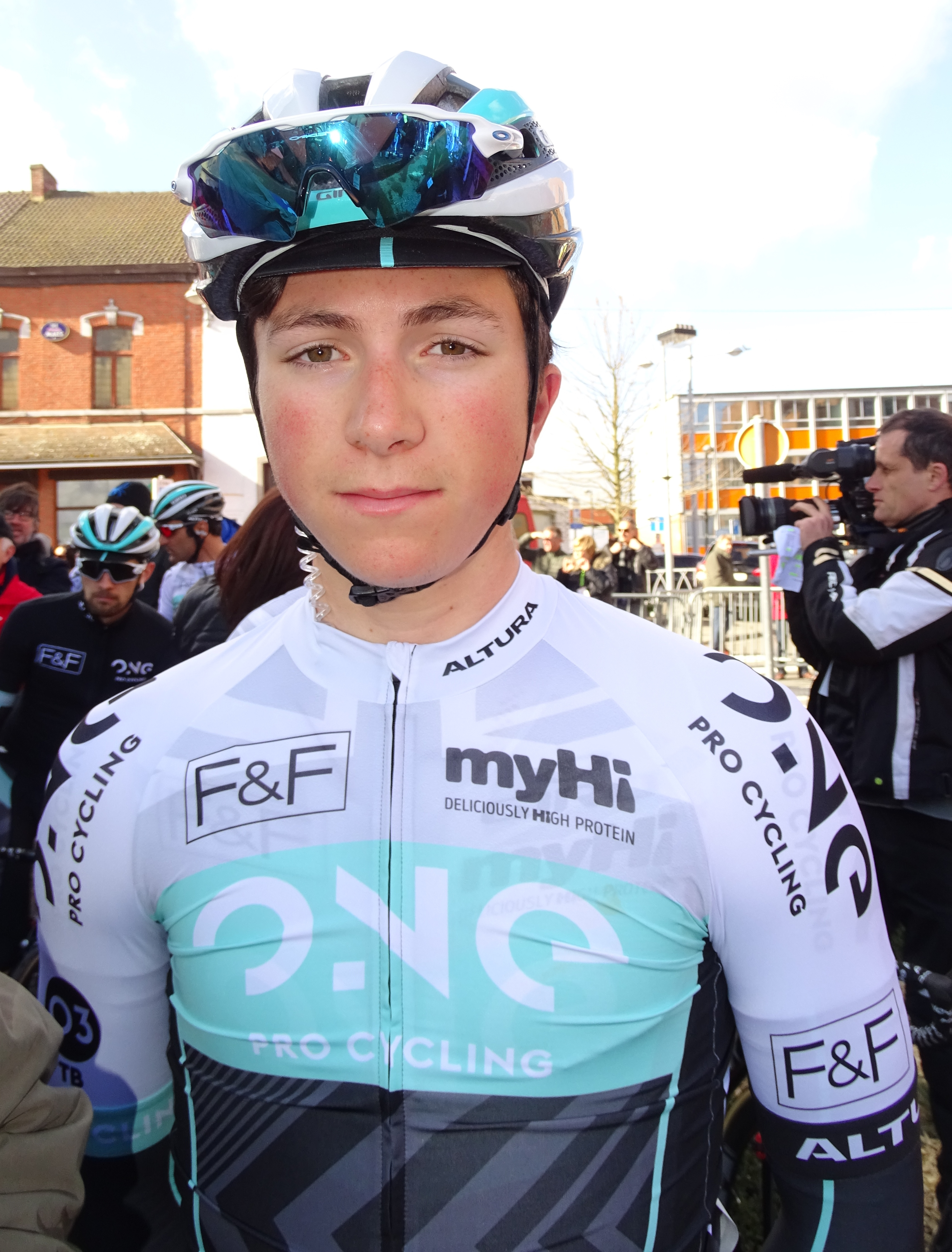 Reportage réalisé le mercredi 2 mars à l'occasion du départ du Samyn des Dames 2016 et du Samyn 2016 à Quaregnon, Belgique.